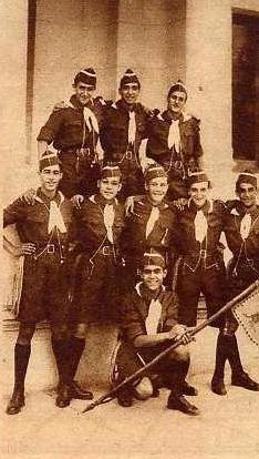 Patrulla del Kanguro de Málaga camino al jamboree de Birkenhead (1929)